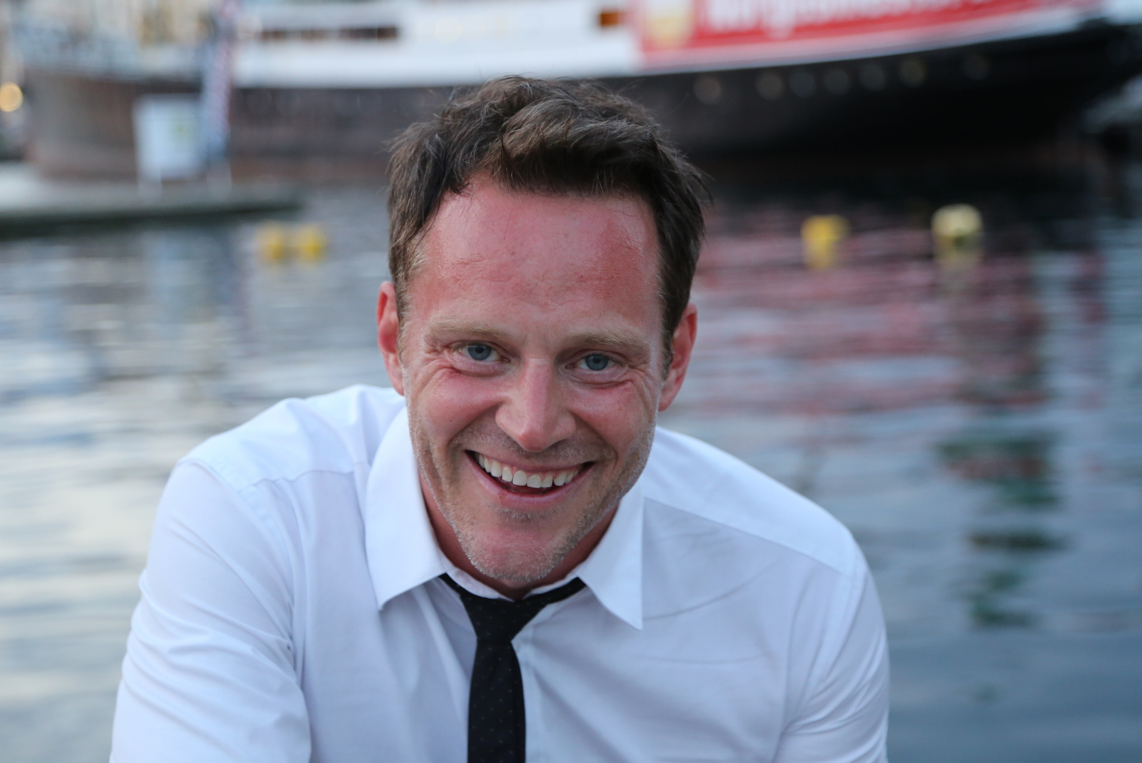 Heine Totland norsk musiker